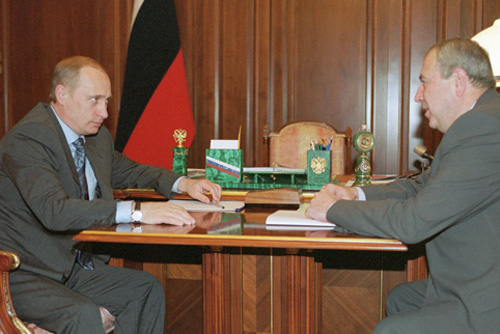 МОСКВА, КРЕМЛЬ. С Министром по атомной энергии Александром Румянцевым.